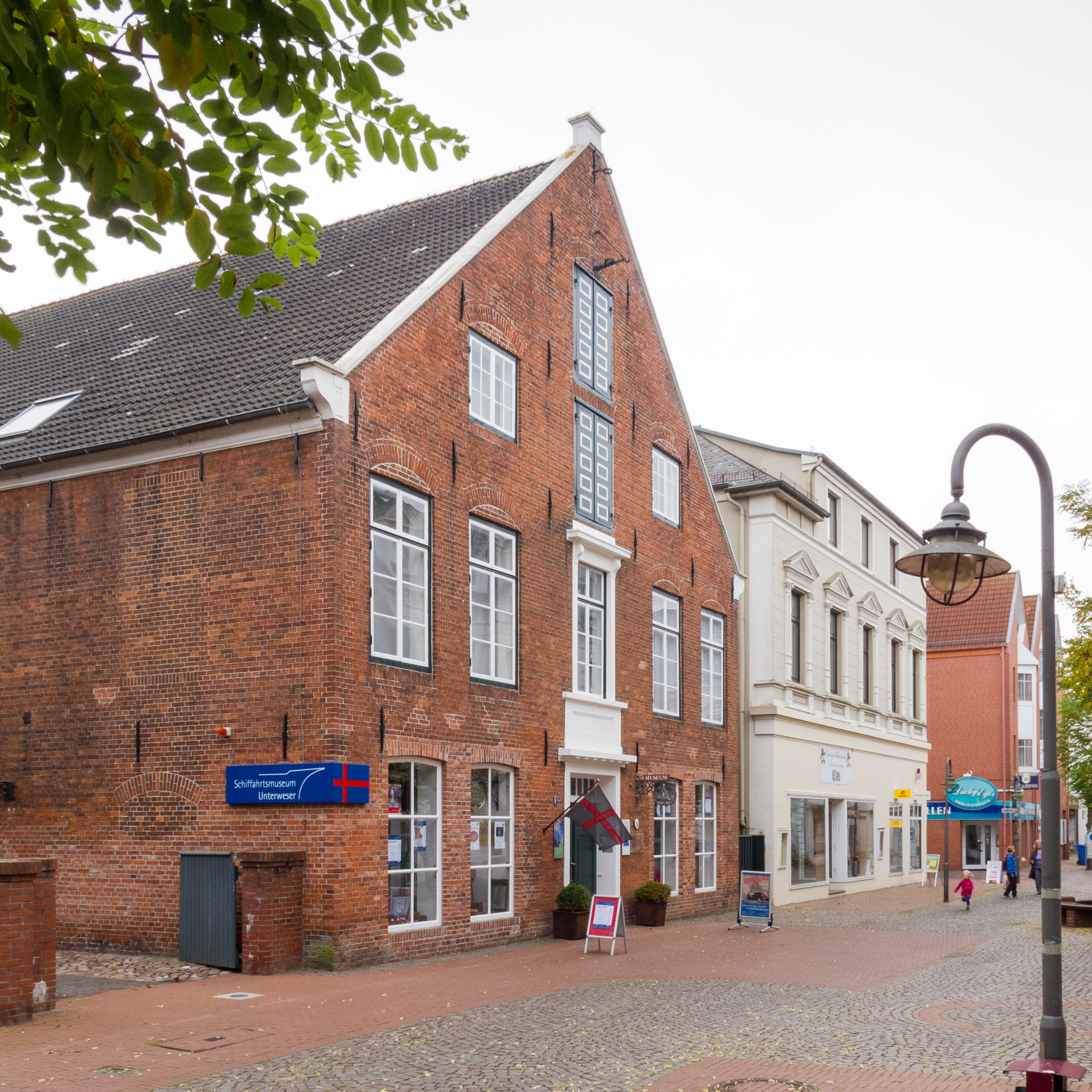 Brake/Unterweser: "Haus Borgstede & Becker", 1808 erbautes Packhaus, heute genutzt als Schifffahrtsmuseum der Oldenburgischen Unterweser.